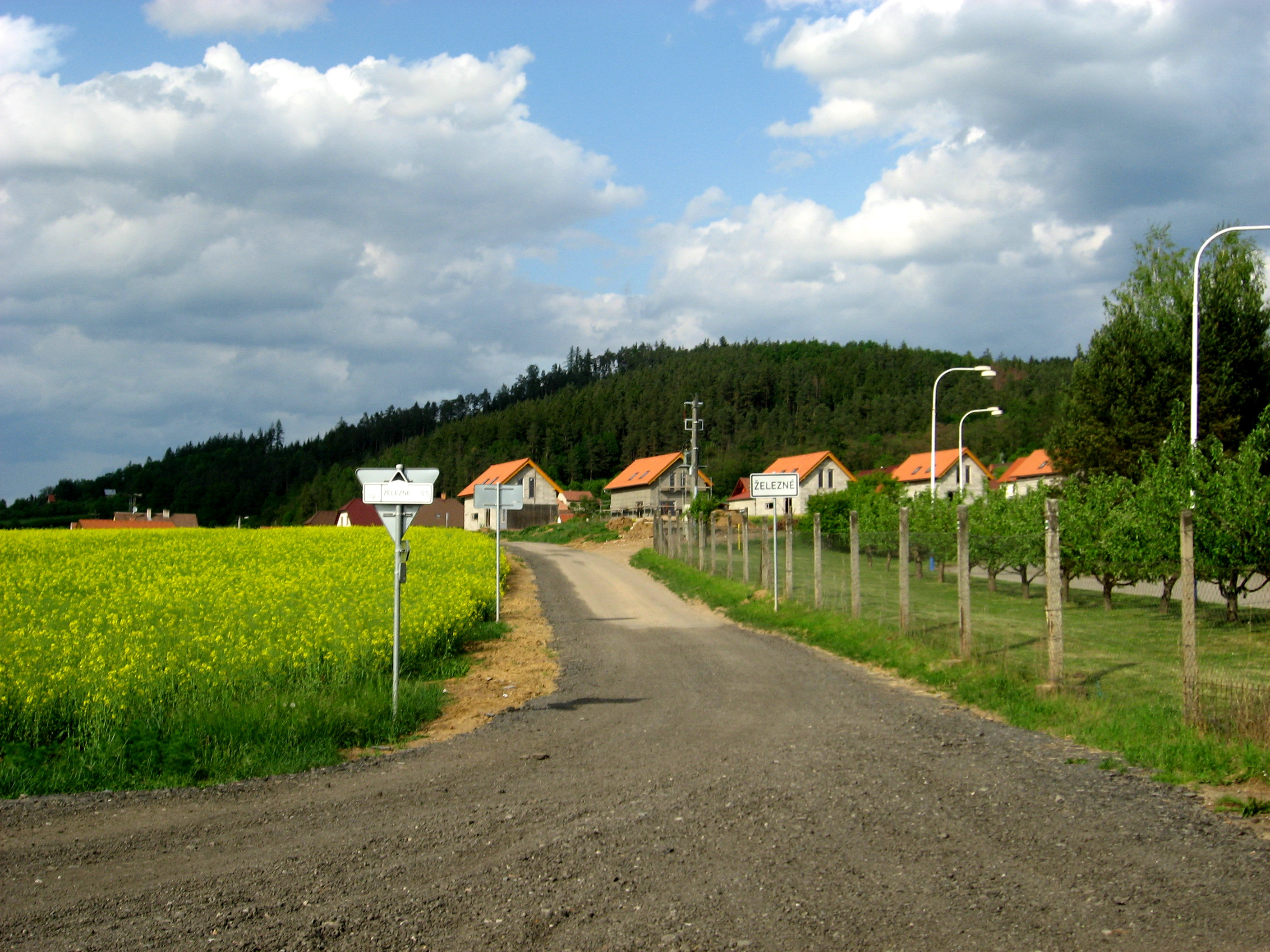 Železné